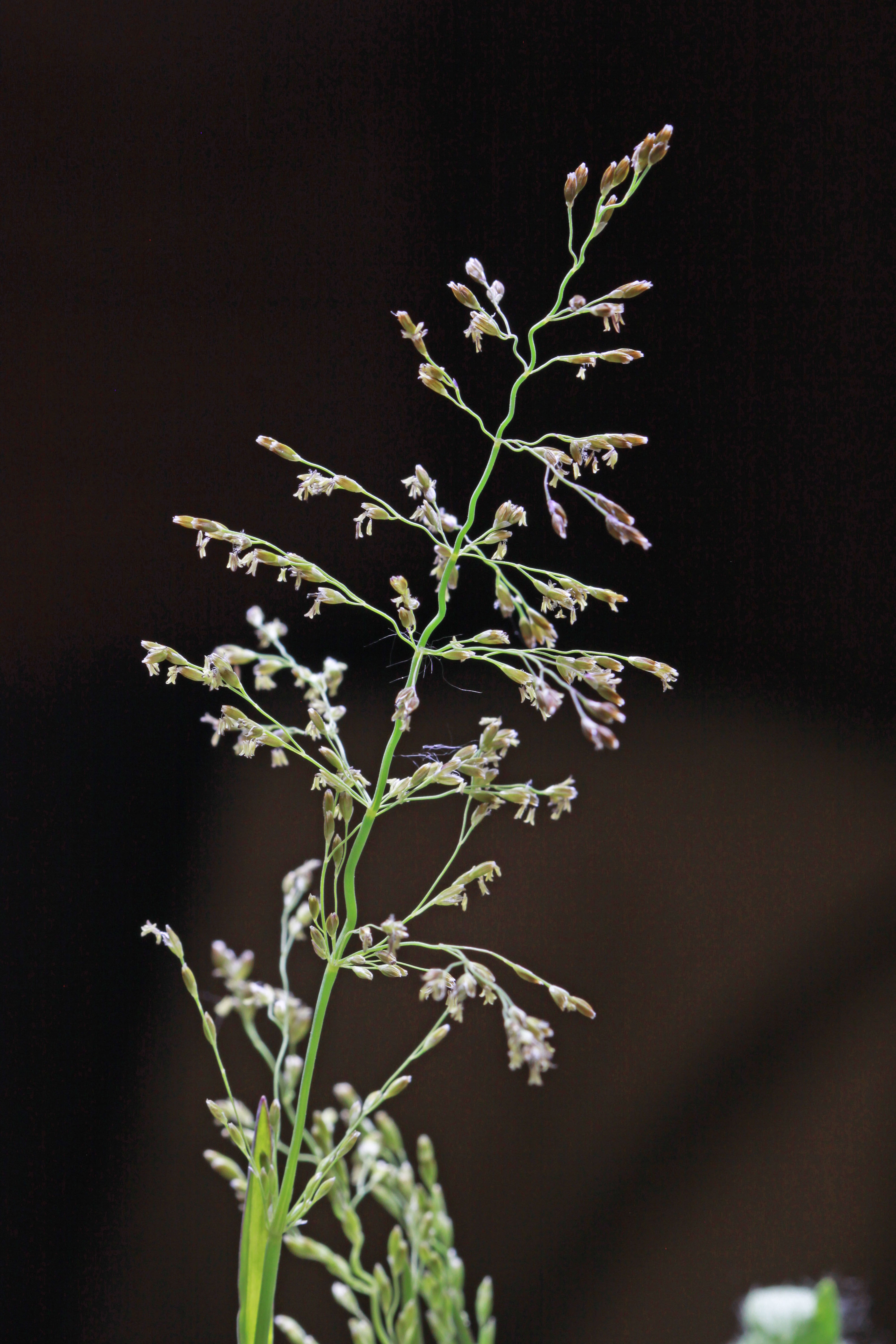 Catabrosa_aquatica ligula